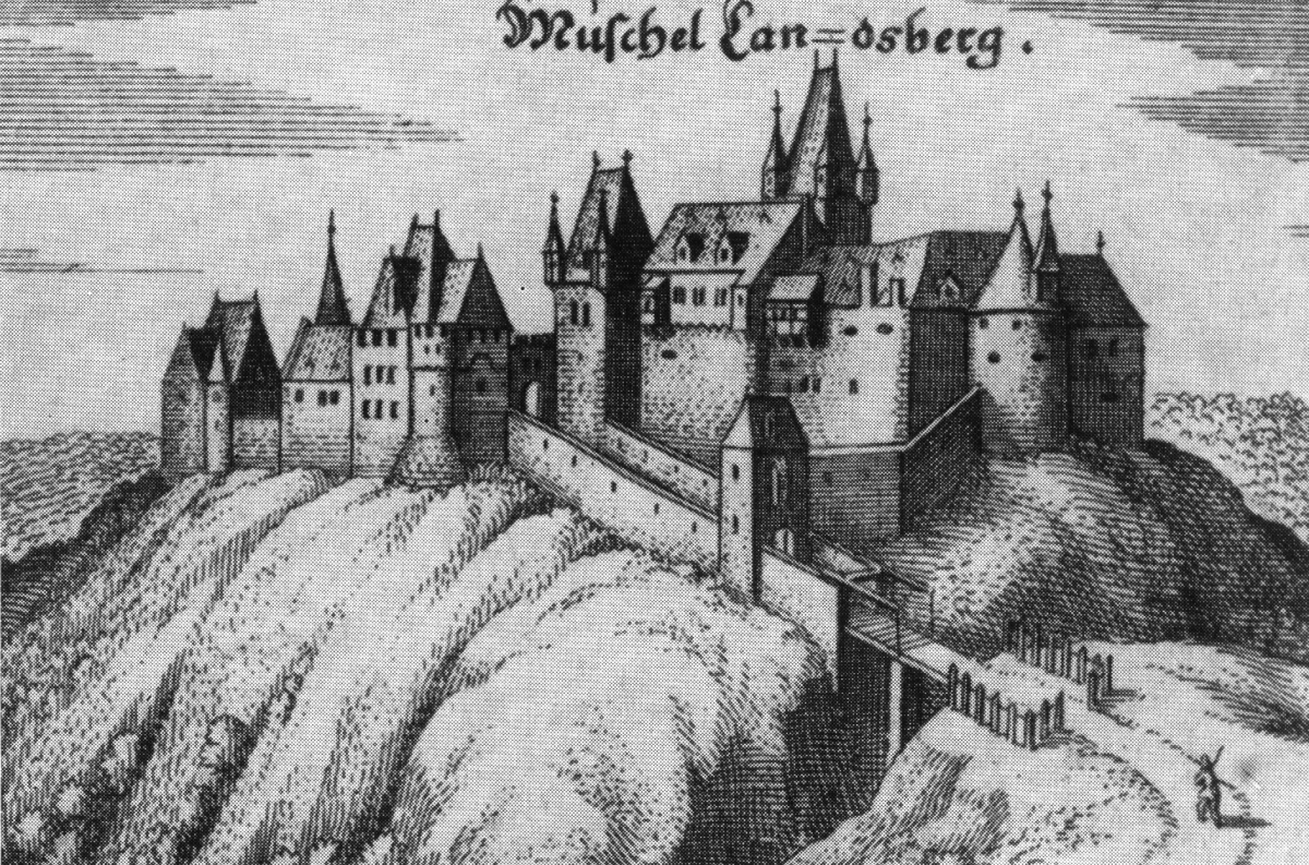 Muschel Landsberg – Kupferstich nach Matthäus Merian